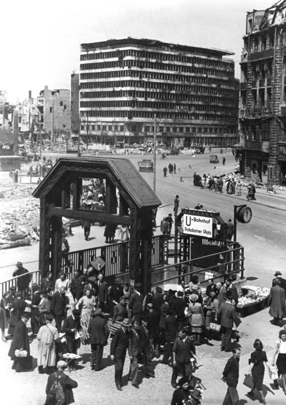 Berlin, Potsdamer Platz mit U-Bahn-Eingang Zentralbild-Cürlis Berlin im Frühjahr 1946 Potsdamer Platz: Blick vom Haus Vaterland nach Nordwesten auf das Columbushaus. 261-46 Information added by Wikimedia users.